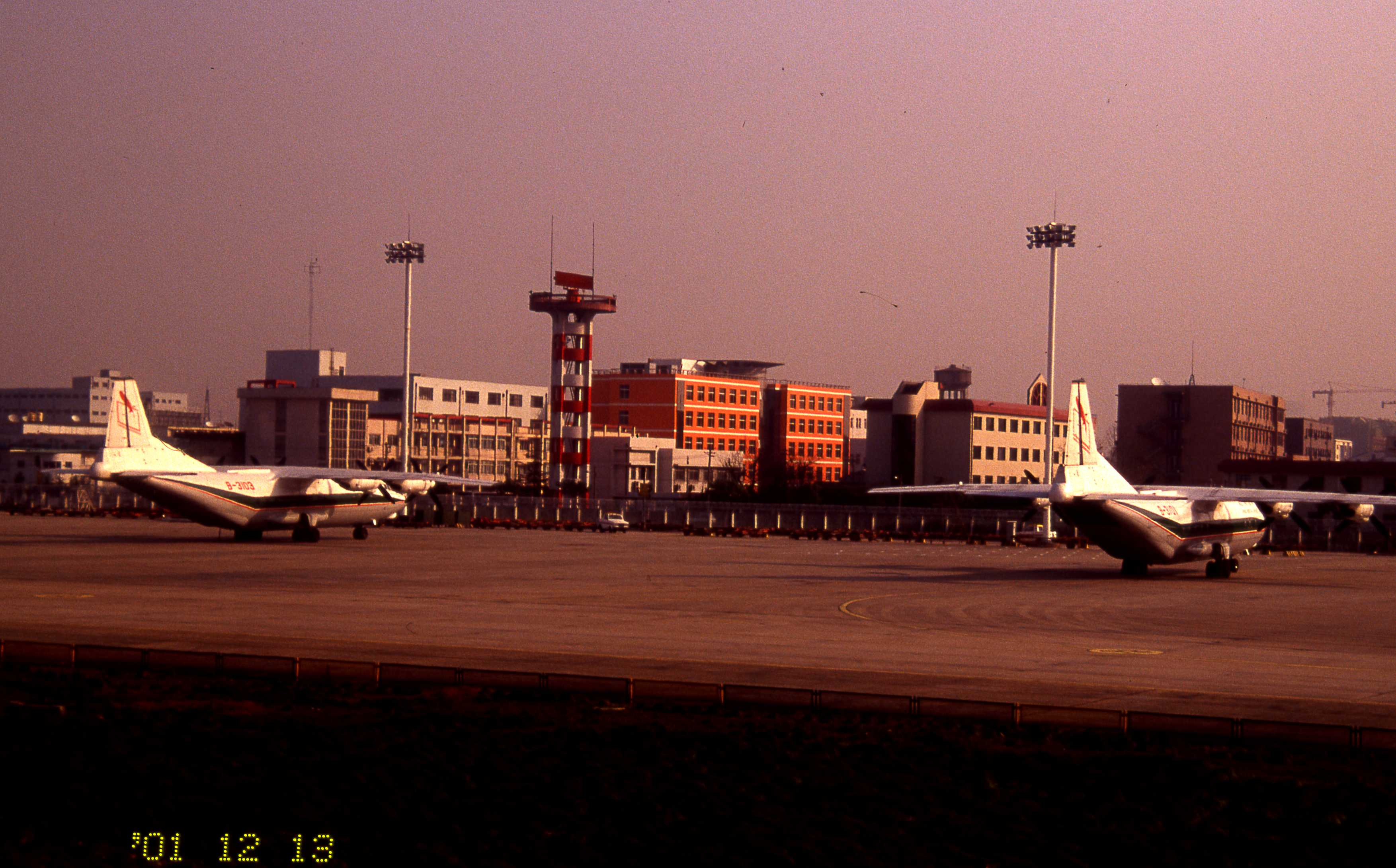 上海空港